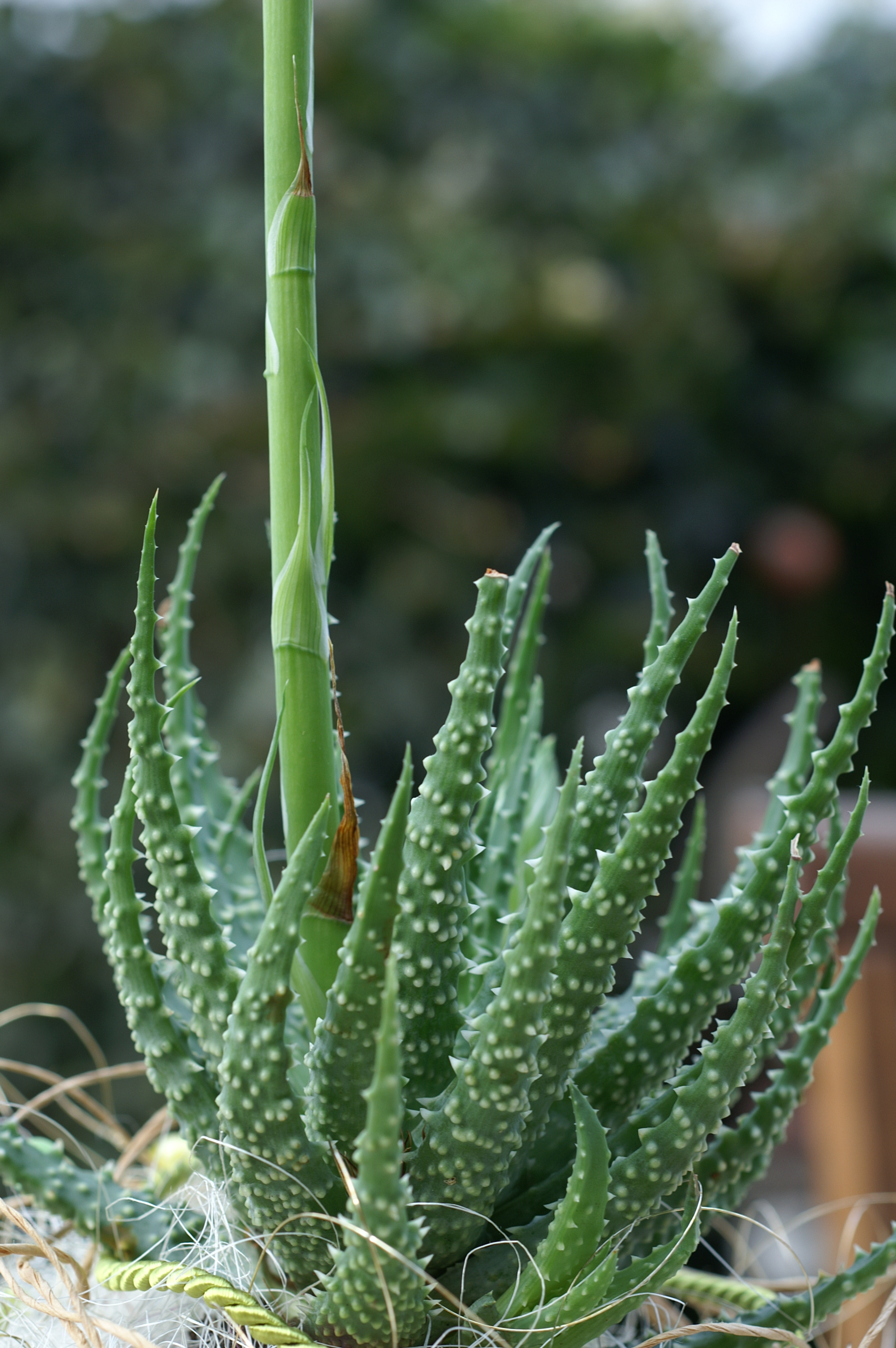 Die Aloen (Aloe) sind eine Pflanzengattung aus der Familie der Affodillgewächse (Asphodelaceae). Zur Gattung gehören etwa 400 Arten. Auf den Bild sieht man die Zimmerpflanze Aloe humilis.